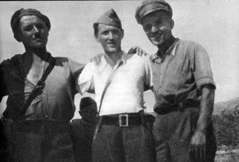 Srpskohrvatski / српскохрватски: Bataljon "Divizionario" 45. divizije. S leva na desno: komandir voda Miha Počervina, komandir 1. čete Kosta Nađ i zamenik komandira Peko Dapčević.